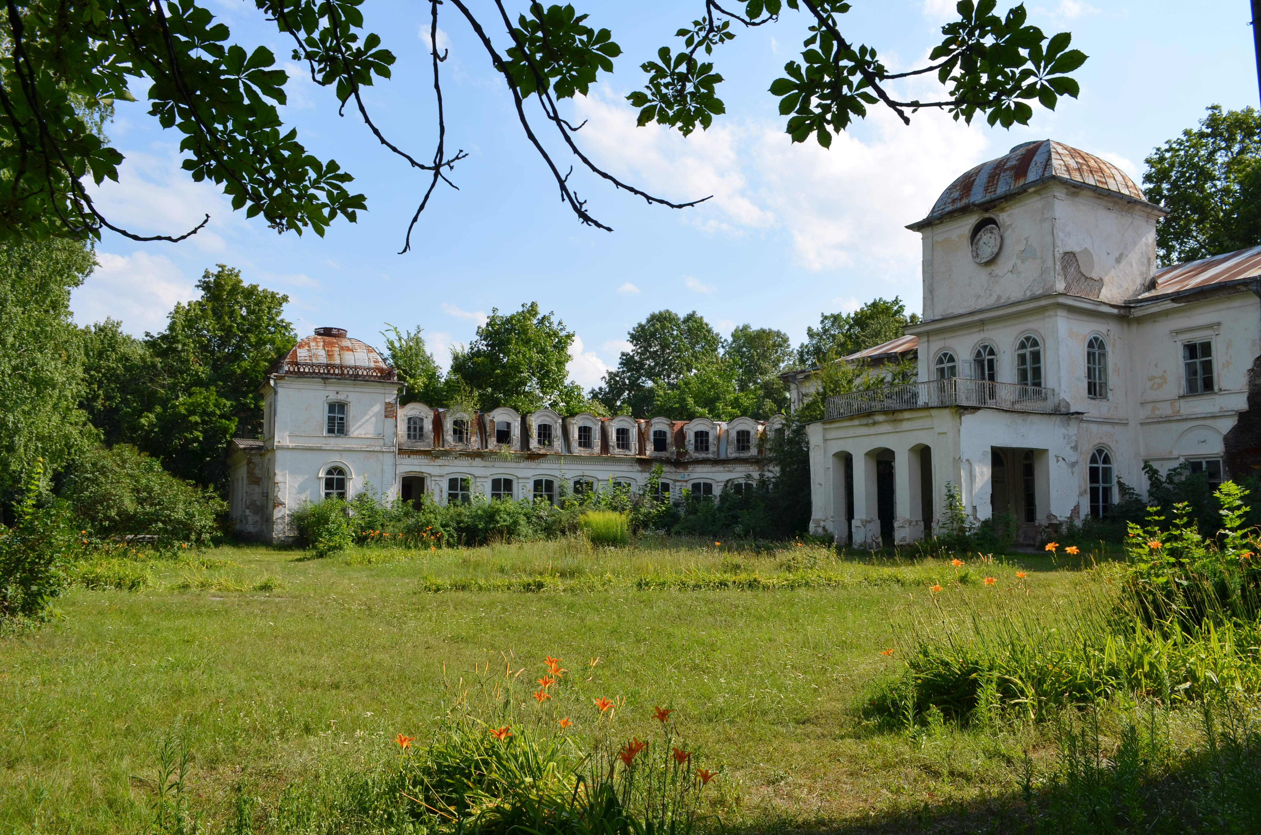 Садиба декабристів Муравйових-Апостолів